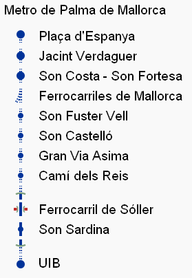 Plan of Palma de Mallorca Metro